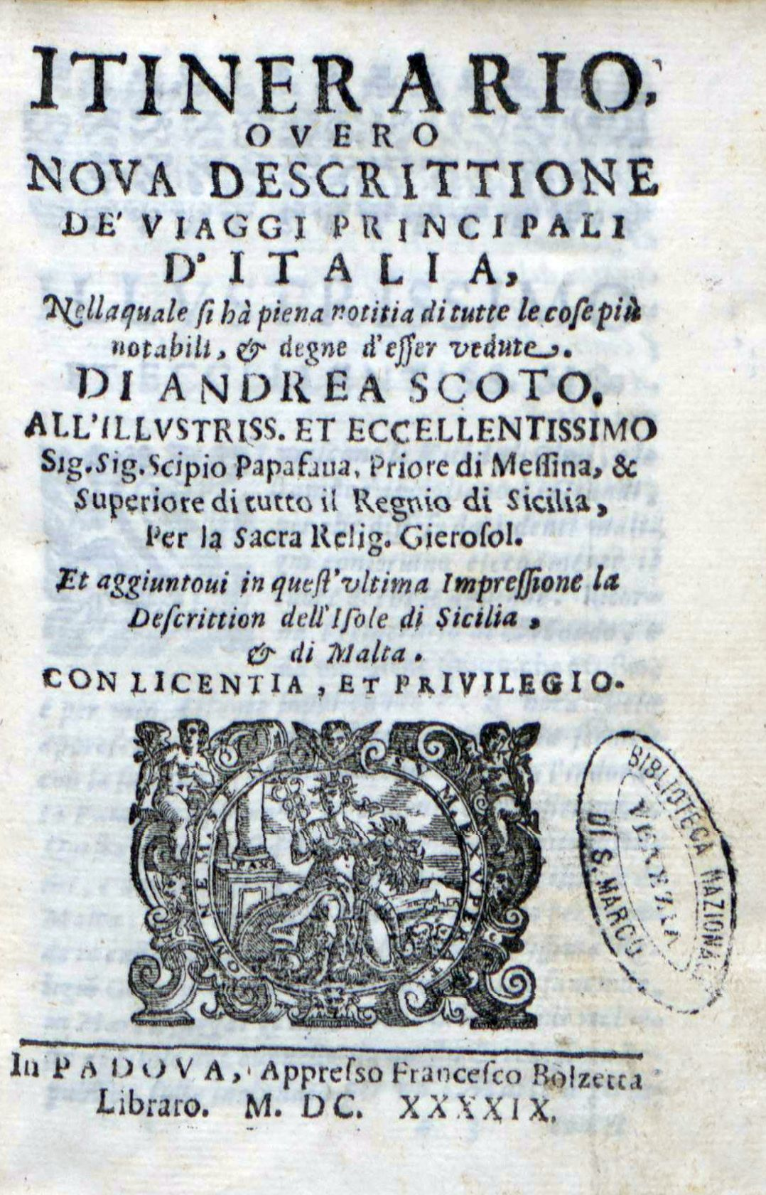 Frontespizio